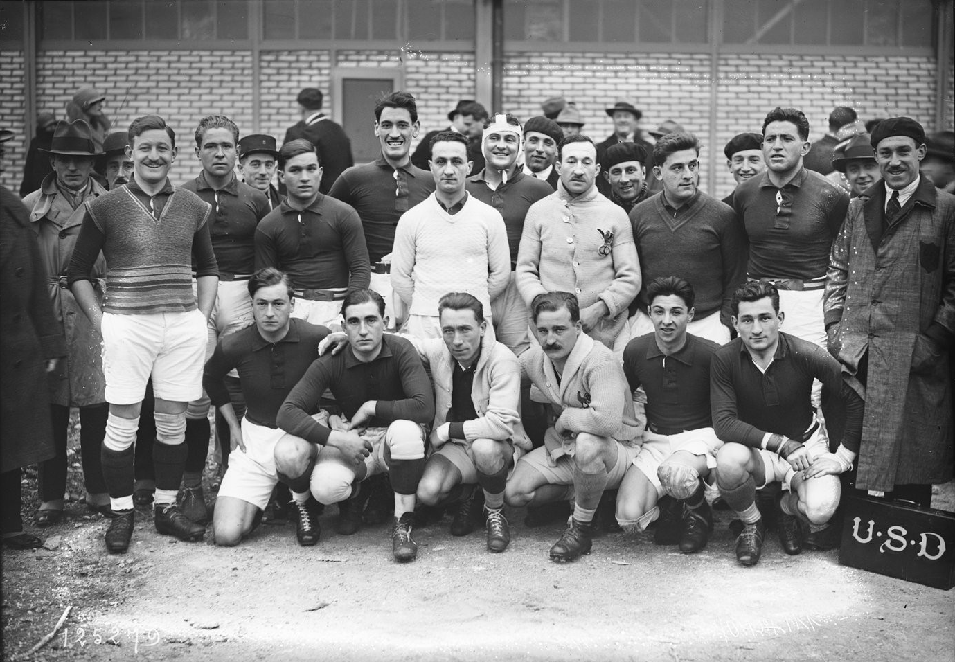 Parc des Princes, 11/12/27, rugby, équipe U.S. Dacquoise.